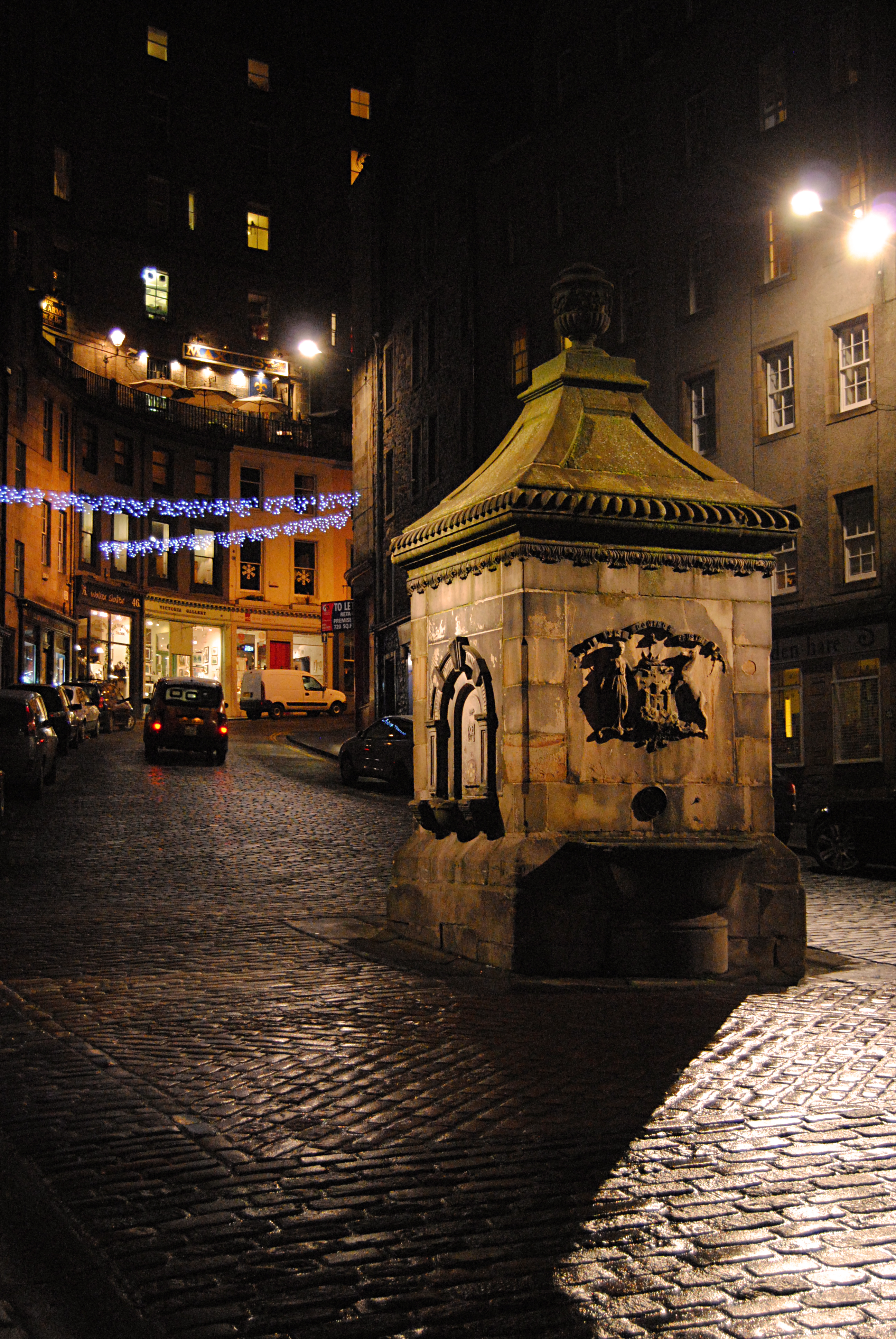 The north-east end of the Grassmarket in Edinburgh.